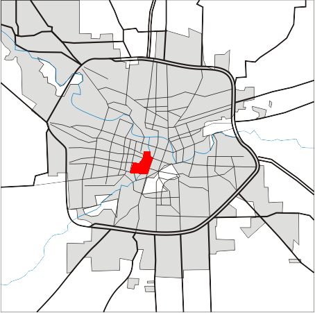 Marcación del barrio Güemes de Córdoba,Argentina